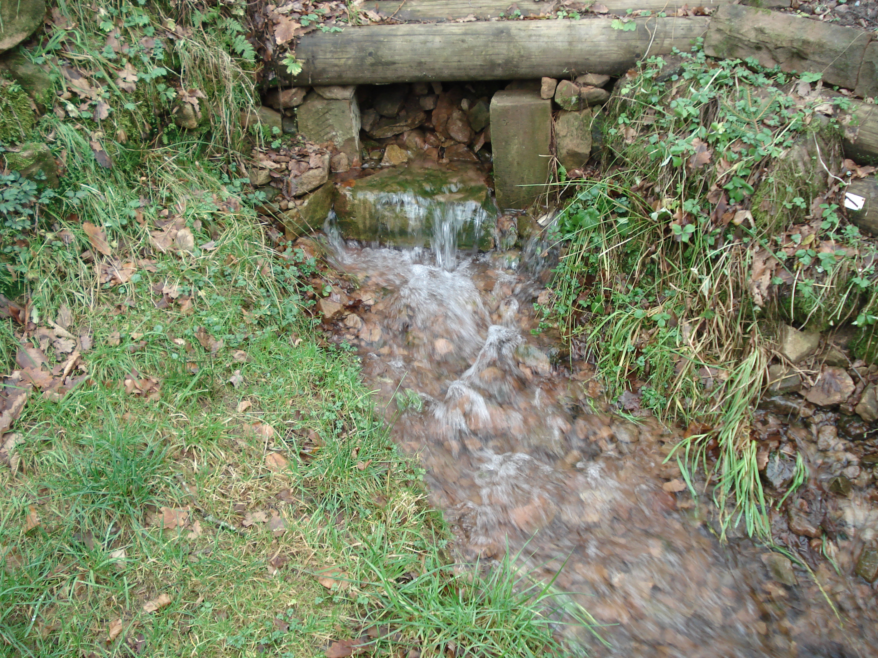 Der Ruhbrunnen in Frammersbach ist der Ursprung des Linderbaches